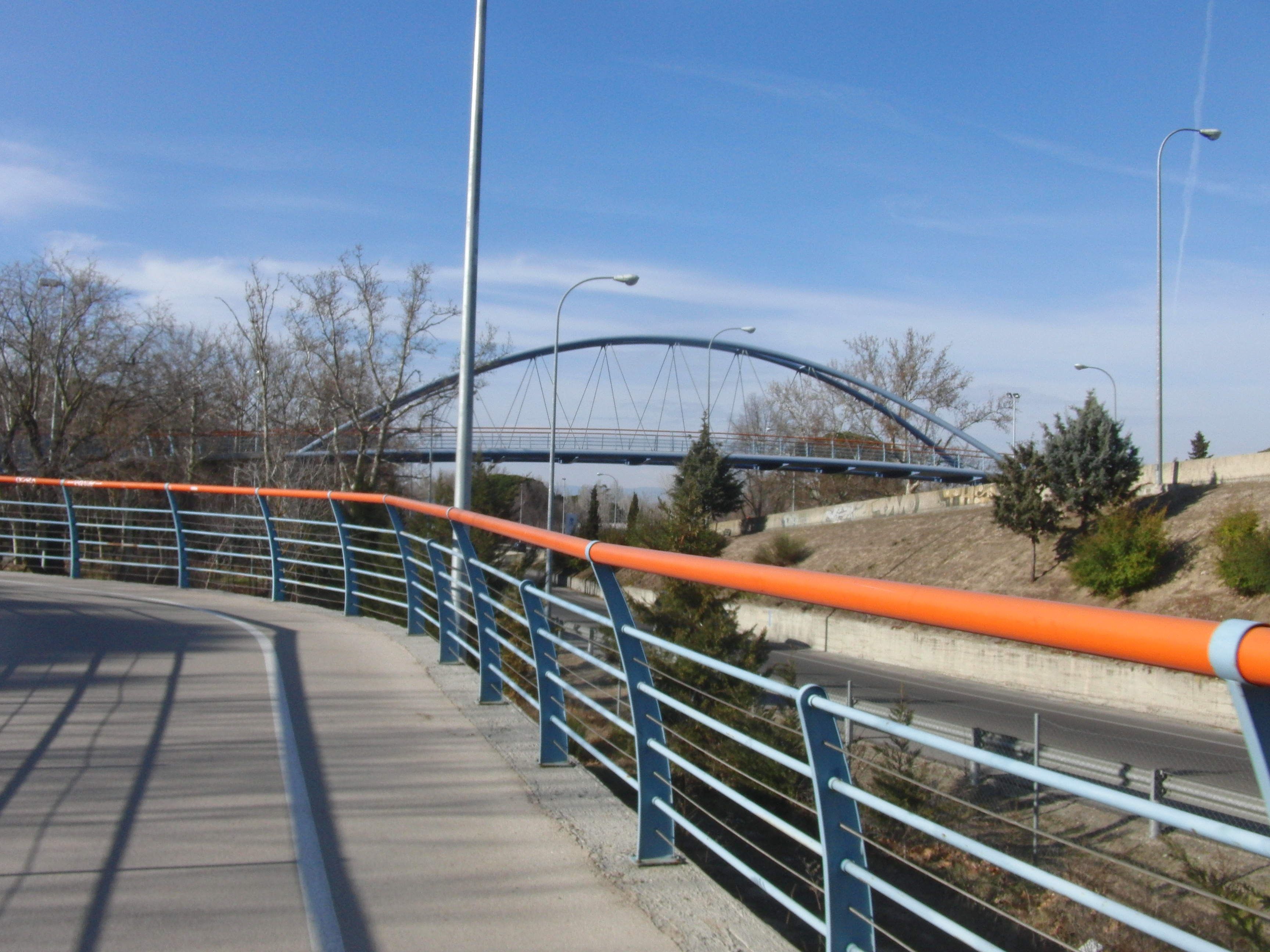 39 Anillo Verde PK 45.9 - 16.25 Puente saliendo de la Casa de Campo